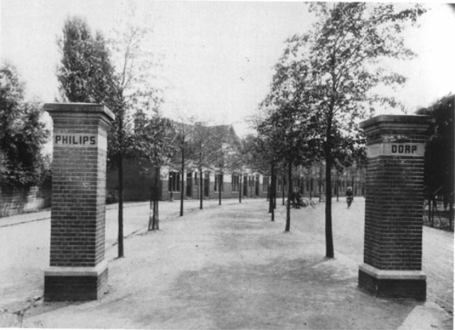 Philipsdorp, ingang St. Elisabethlaan.